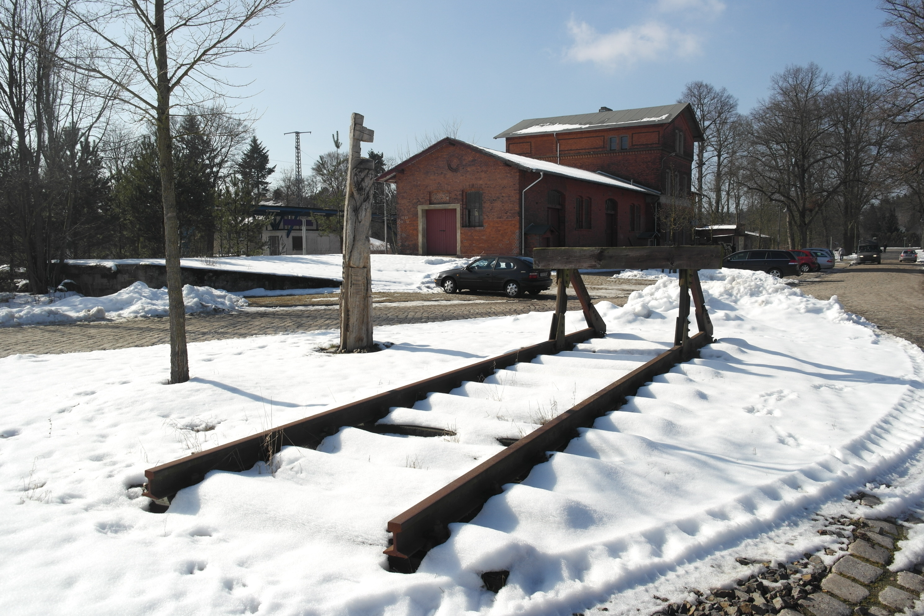 Bahnhof Wiesenburg, denkmalgeschützt. Beginn des Kunstwanderwegs